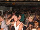 Lundegård dans